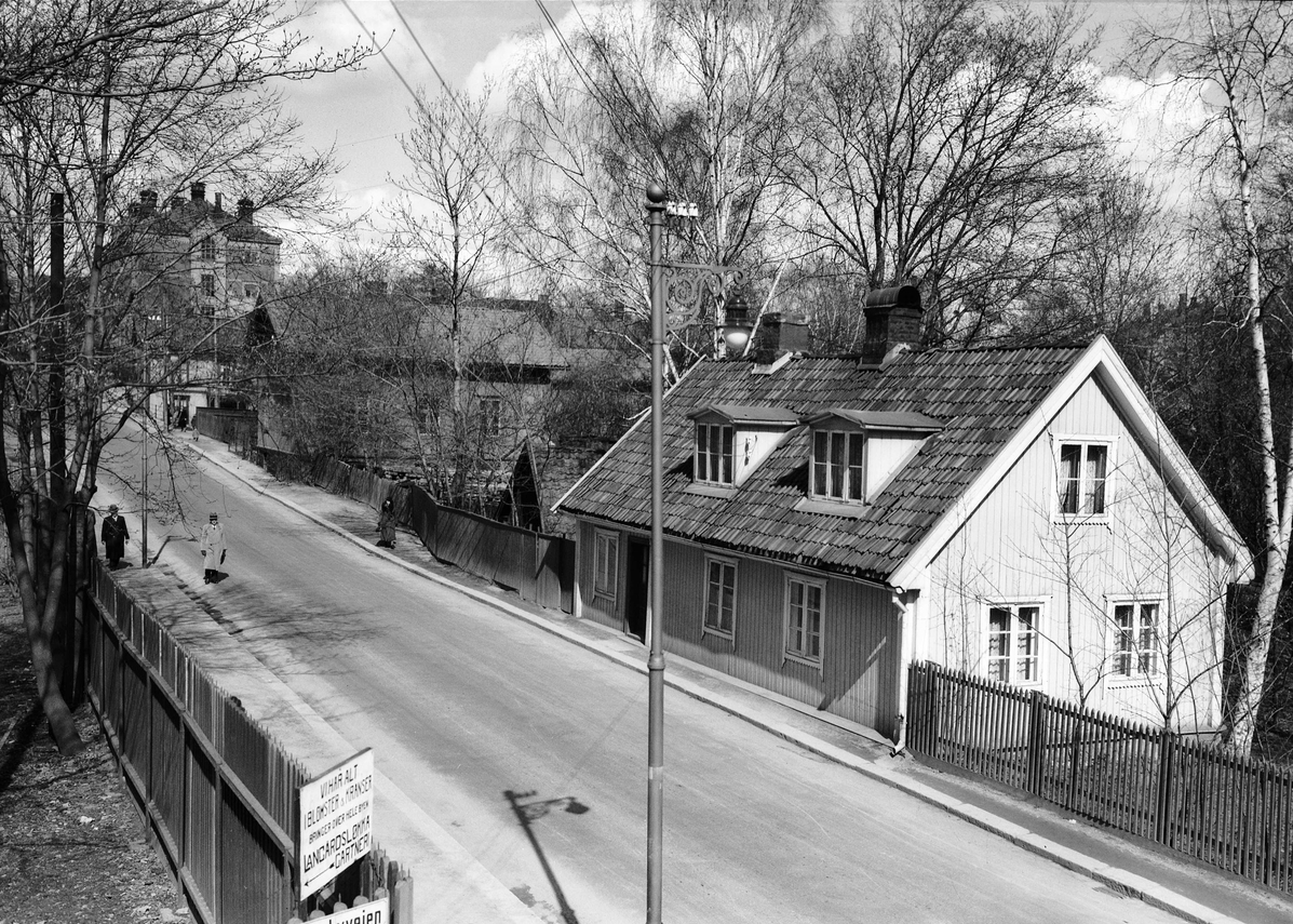 Industrigata 1 og 13, ikke langt fra Munthes plass (ved Briskebyveien). I bakgrunnen ses nr. 30 (Berles skole). Foto: Anders Beer Wilse, fra Byhistorisk samling hos Oslo Museum.